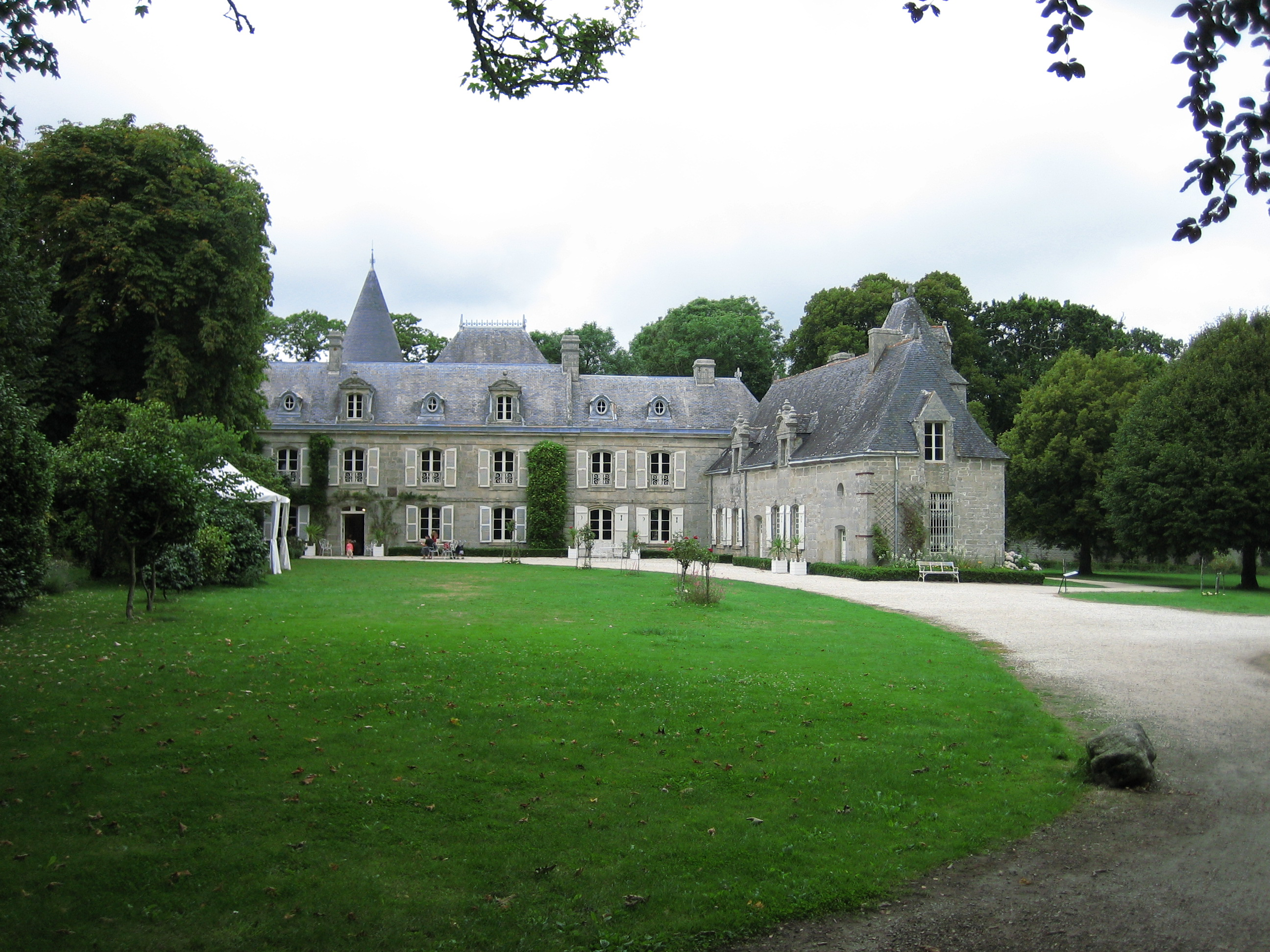 Manoir de Kerazan, vue d'ensemble depuis le parc; Loctudy